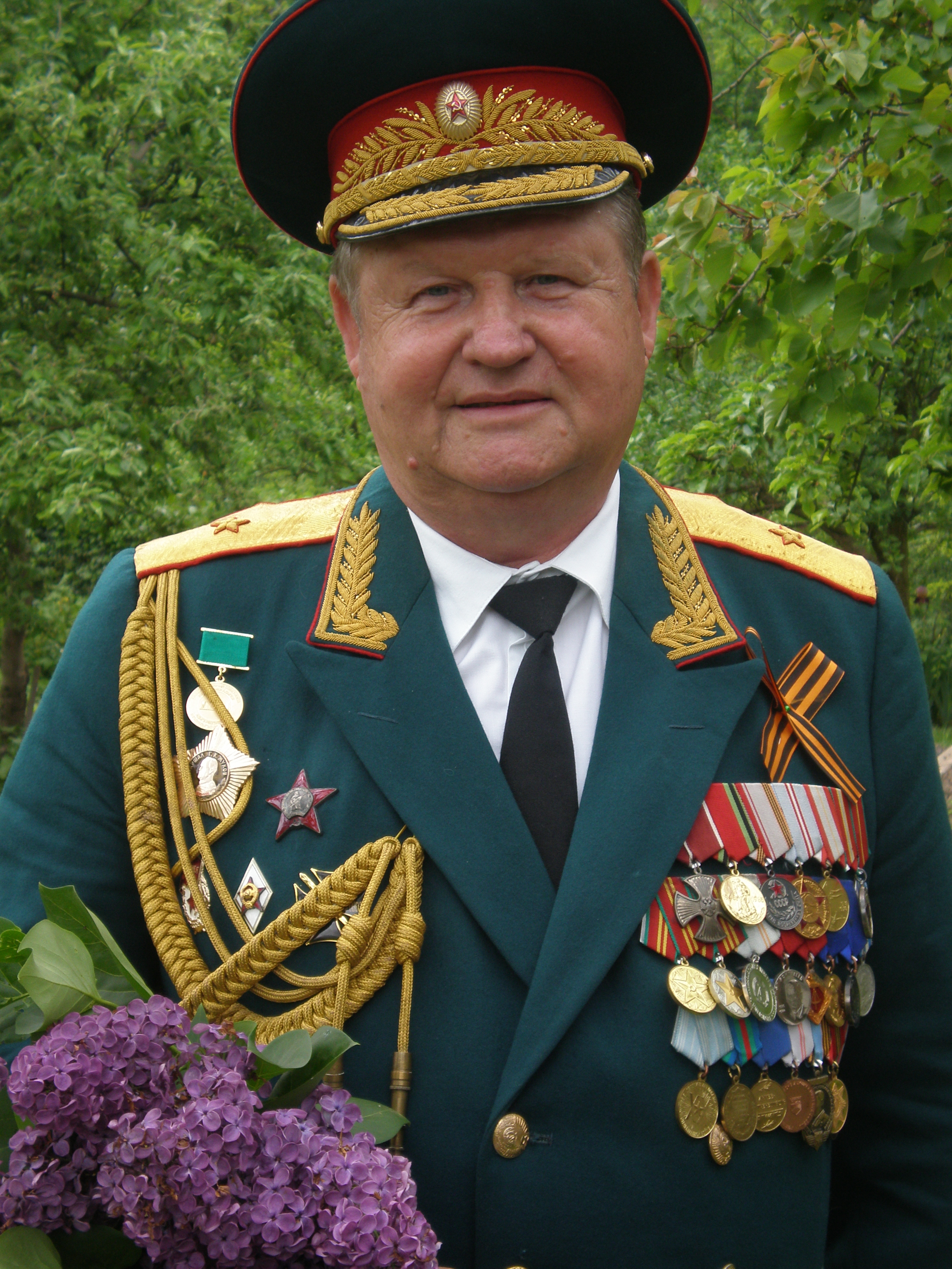 После парада в Майкопе. 09.05.2010